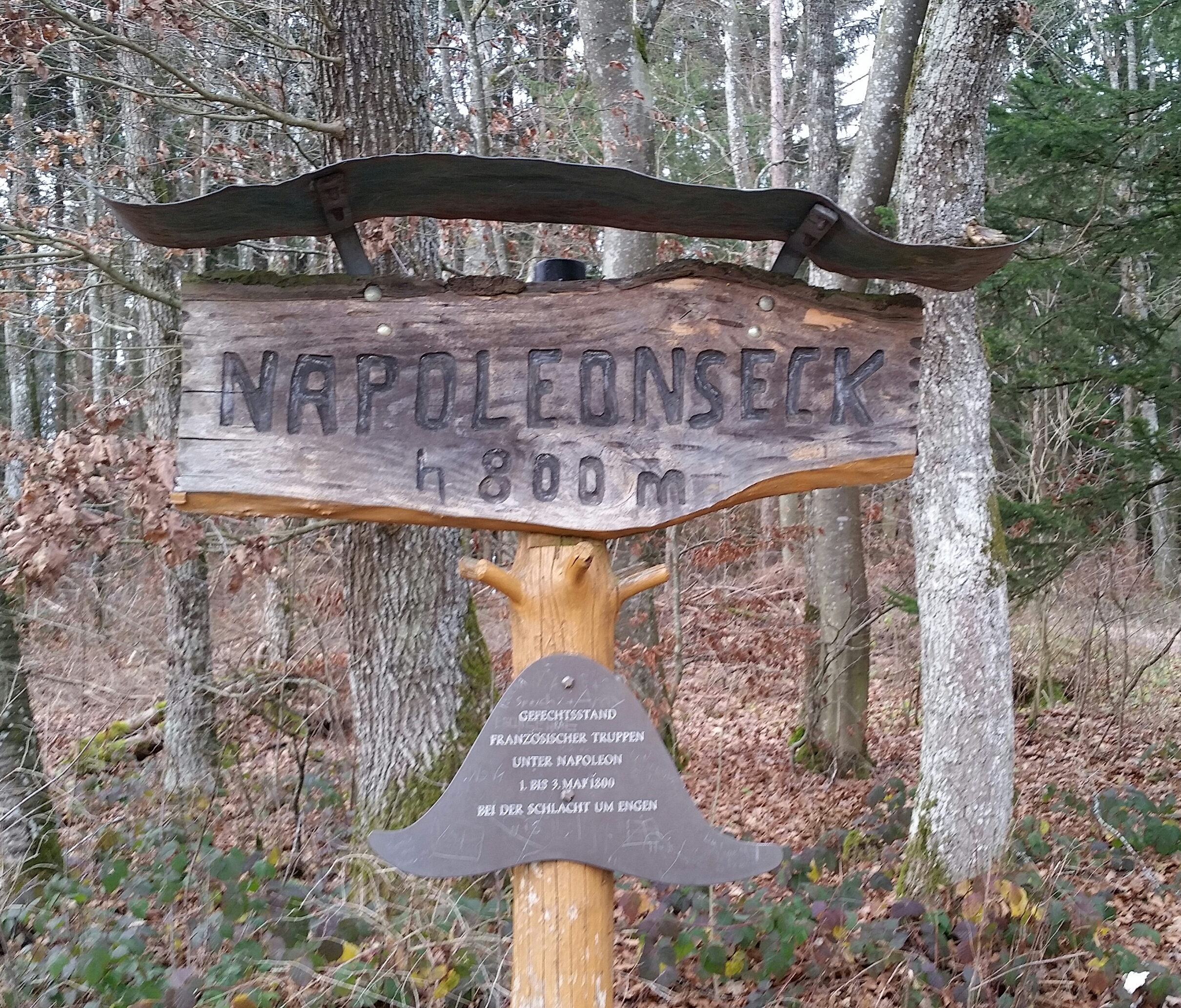 Laut Text der abgebildeten Beschriftung wurden die französischen Truppen von Napoleon befehligt, was aber nicht stimmt. Siehe den Wikipedia-Artikel "Schlacht von Engen" für weitere Informationen.